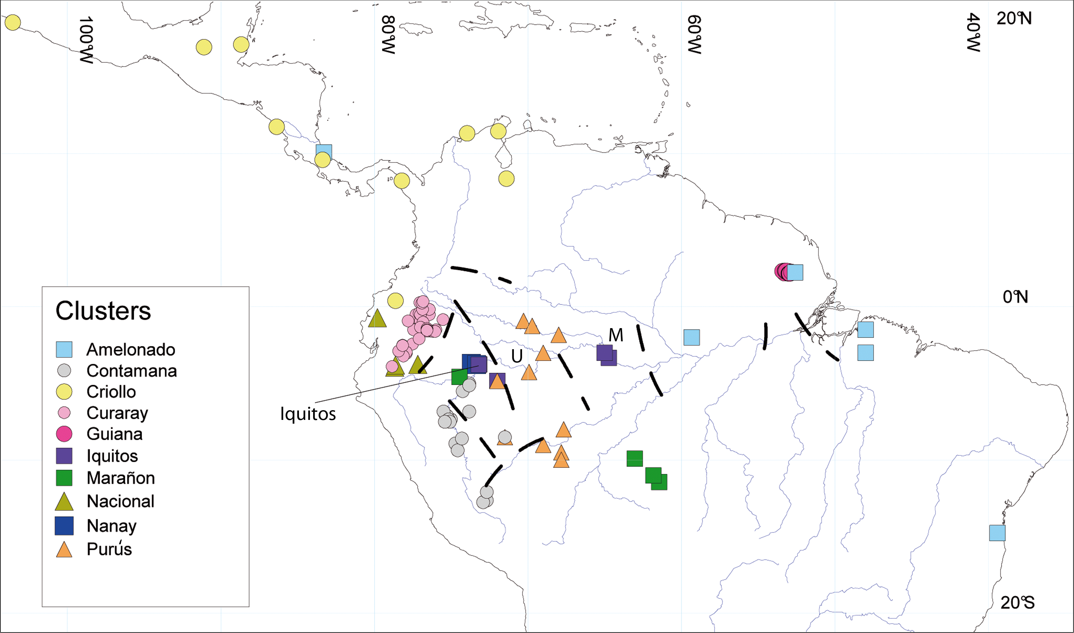 Genetica del Theobroma Cacao